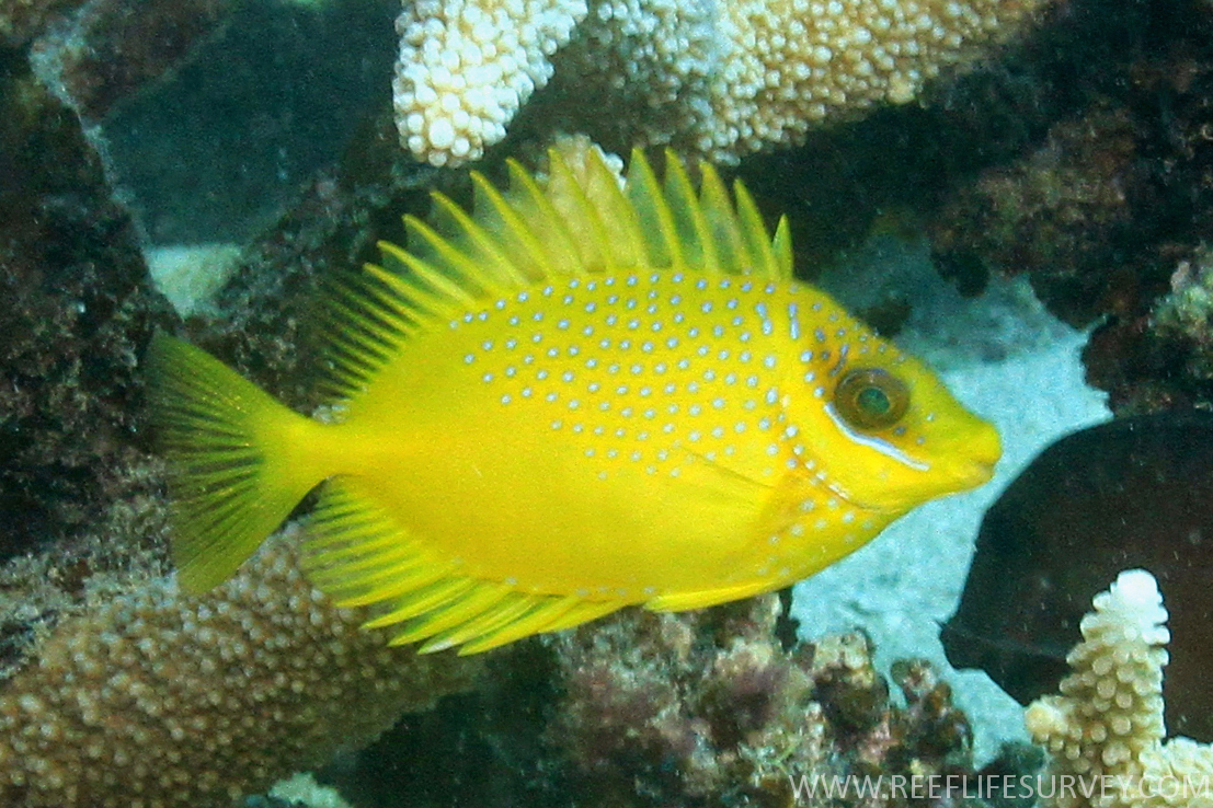 Siganus corallinus juvenil en la Gran Barrera de Arrecifes, Queensland, Australia